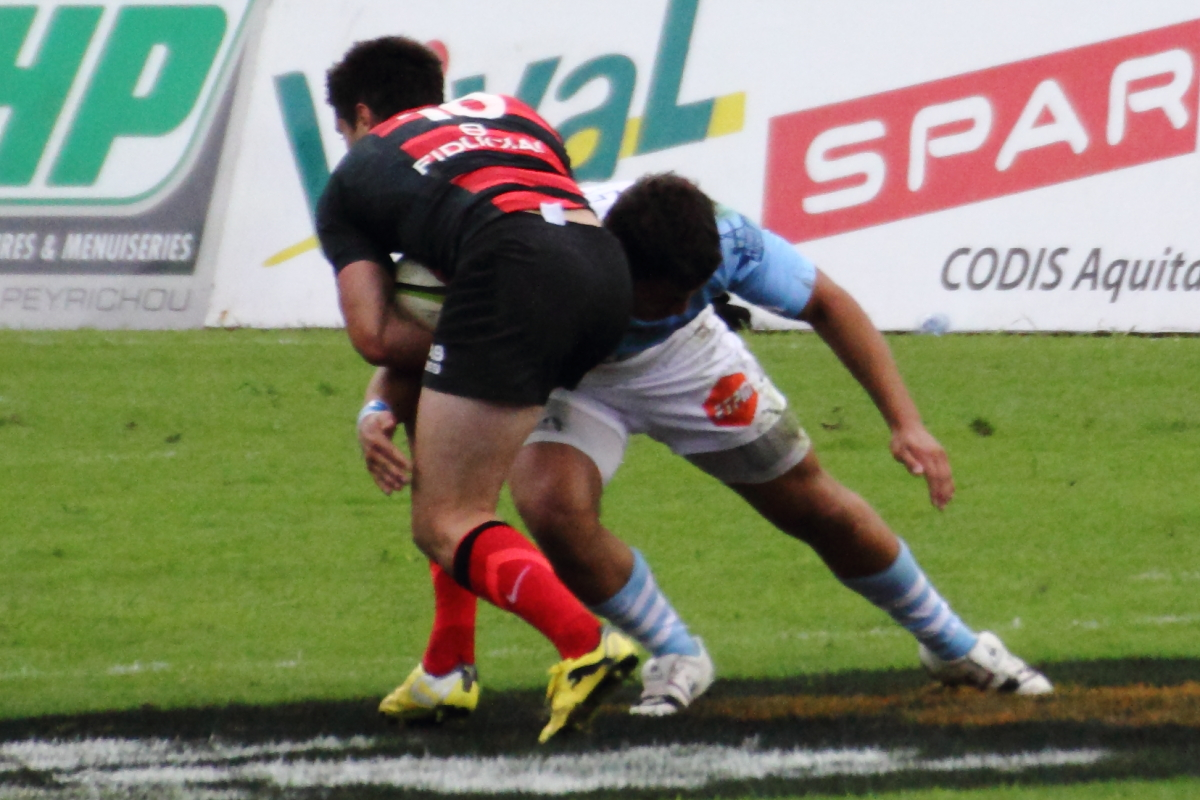 Plaquage sur Nicolas Bézy